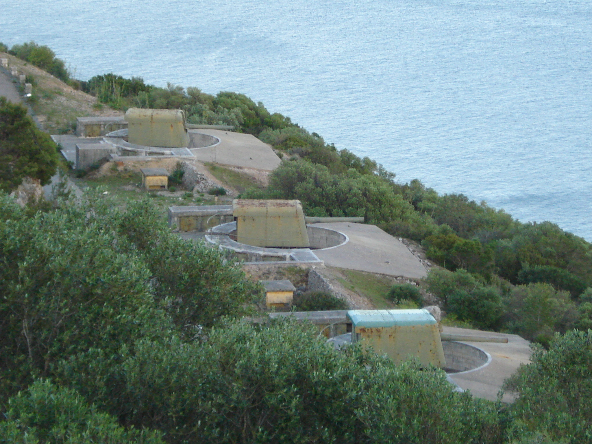 7ª Bataria do Outão, Setúbal